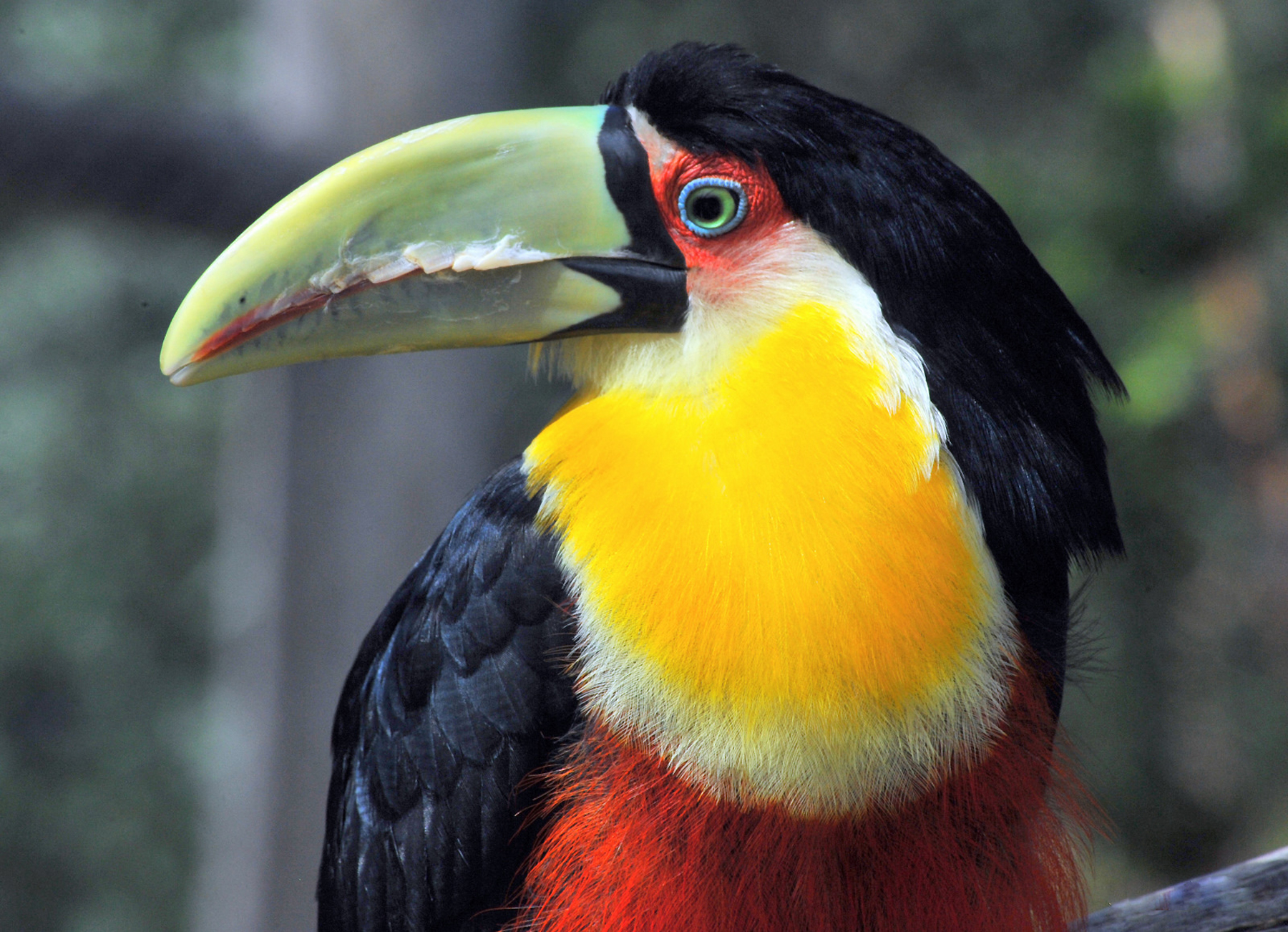 O tucano-de-bico-verde é uma ave piciforme e da família Ramphastidae. Seu nome científico significa: do (grego) ramphastos, ramphestes = longa espada, grande espada; e do (latim) di = separado, apartado; e colorus = colorido; dicolorus = colorido, com cores separadas. ⇒ Ave colorida com nariz grande como uma espada. WikiAves